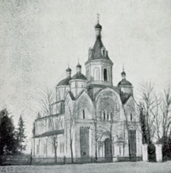 Беларуская (тарашкевіца): Крывошын (Kryvošyn), пляц Рынак (plac Rynak). Касьцёл па маскоўскай перабудове